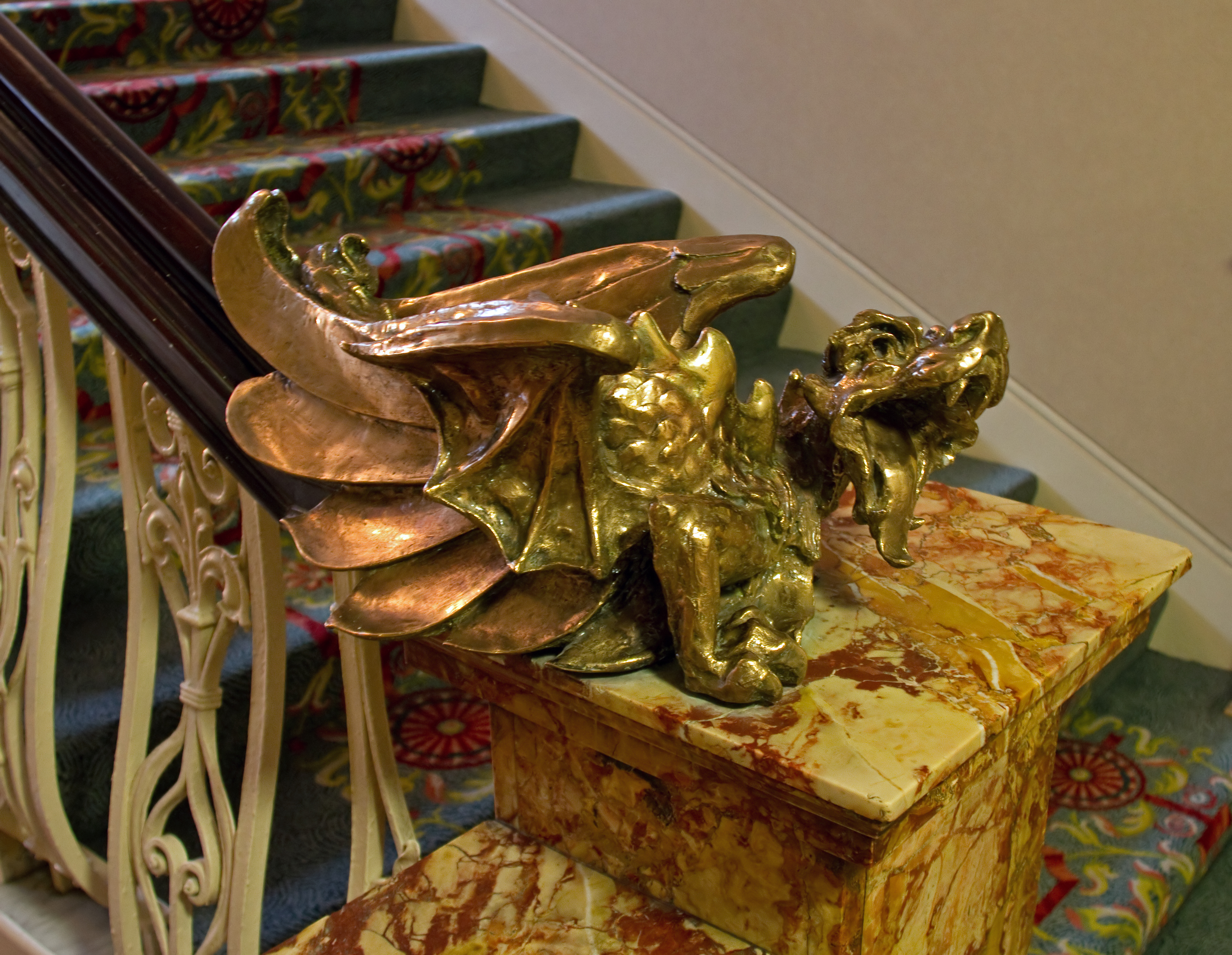 Hotel Russell